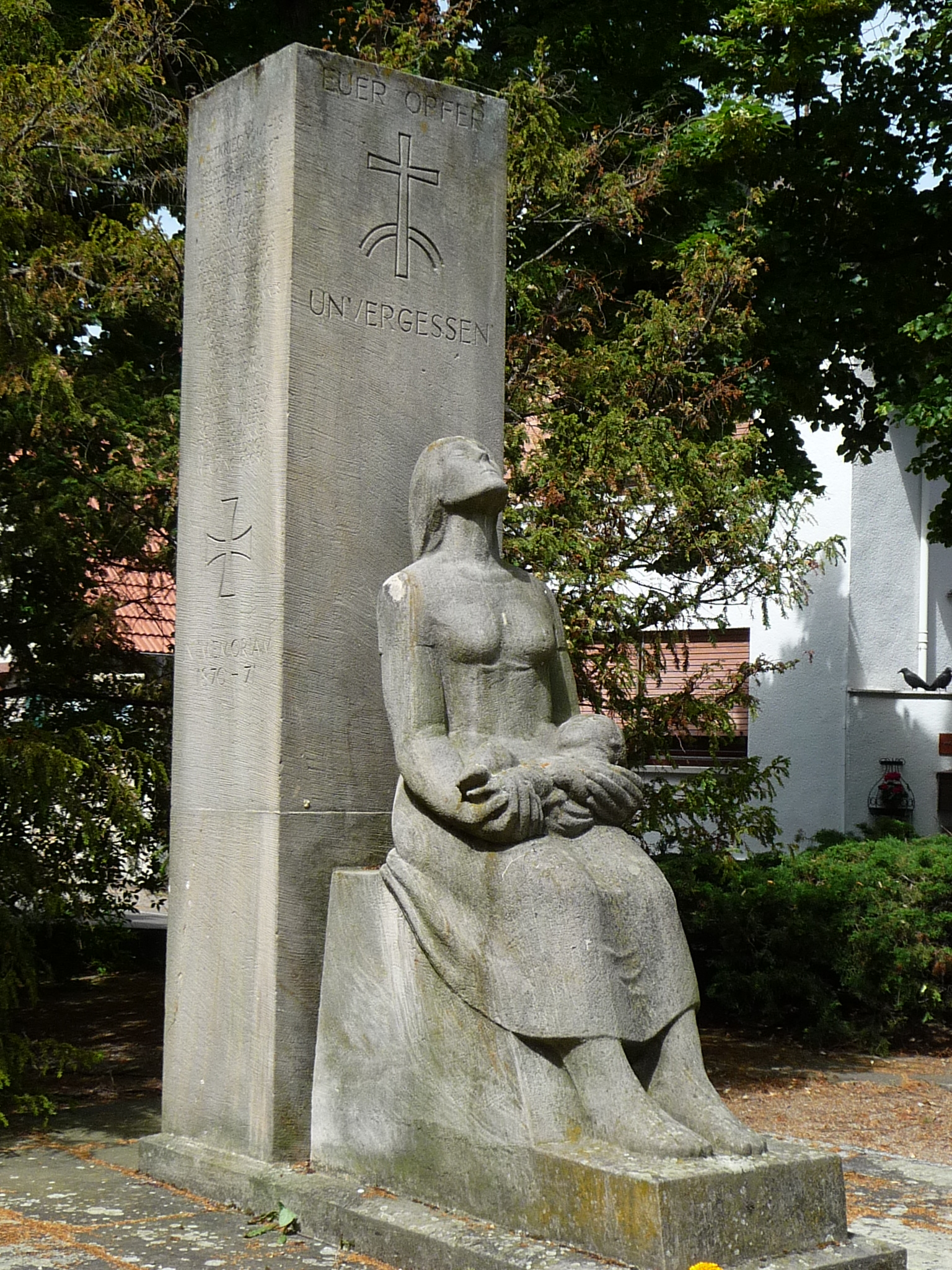 Ungstein ist ein Stadtteil von Bad Dürkheim im Landkreis Bad Dürkheim in Rheinland-Pfalz.